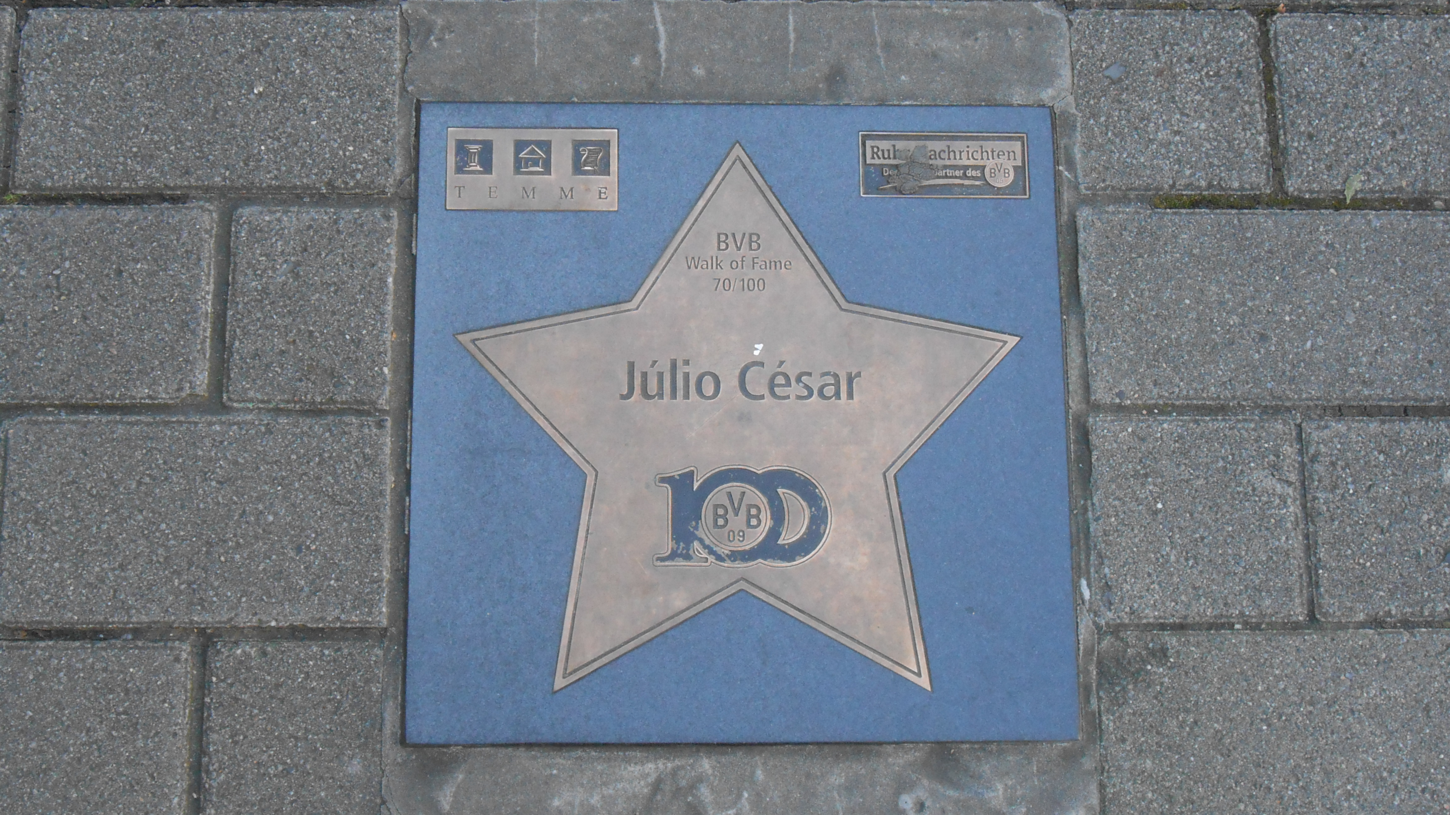 BVB Walk of Fame 70-100ː Júlio César